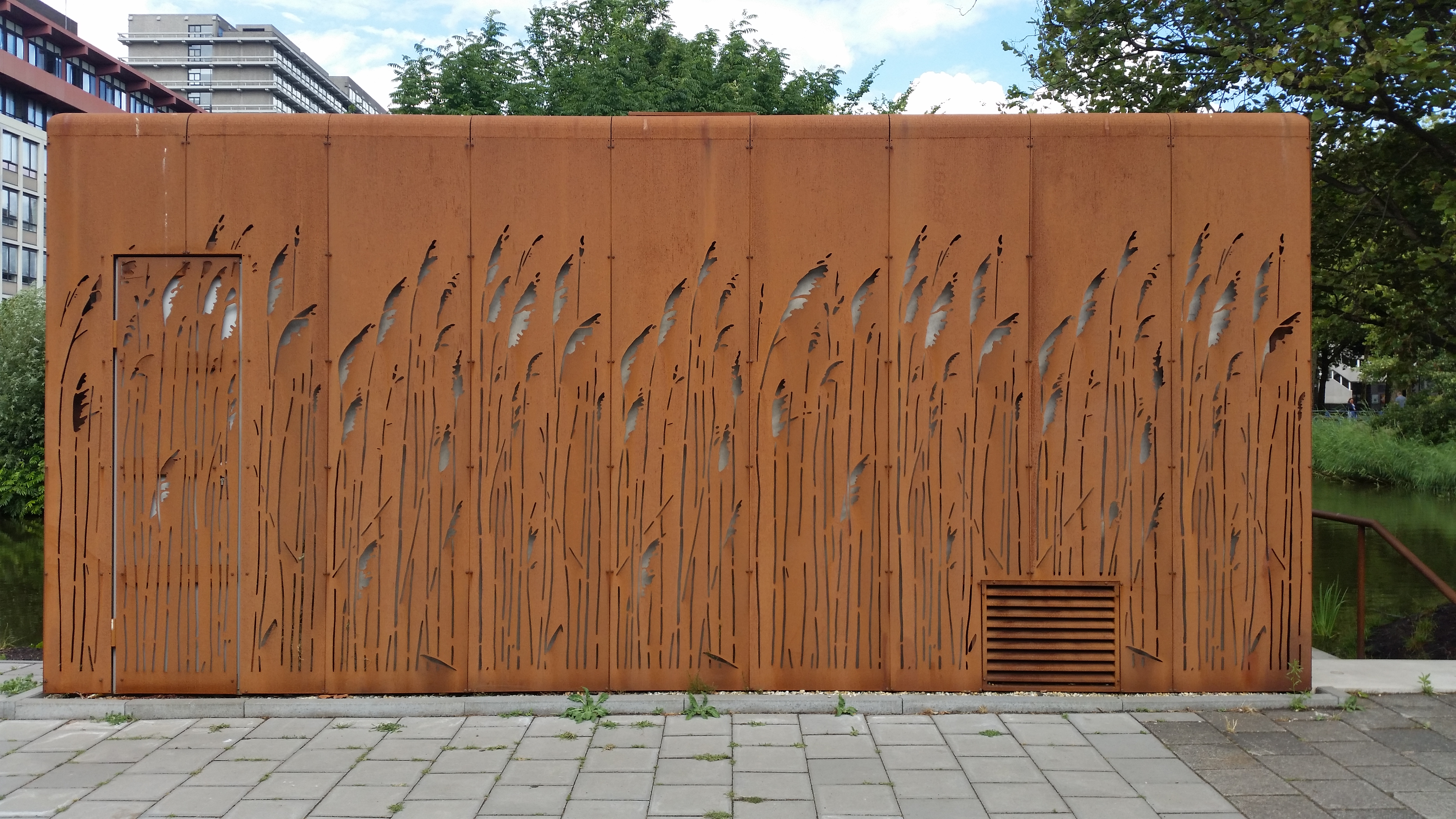 Liander, A.J. Ernststraat, blik op gasreduceerstation